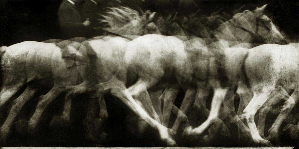 Étienne-Jules Marey, Cheval blanc monté, 1886, locomotion du cheval, expérience 4, Chronophotographie sur plaque fixe, négatif